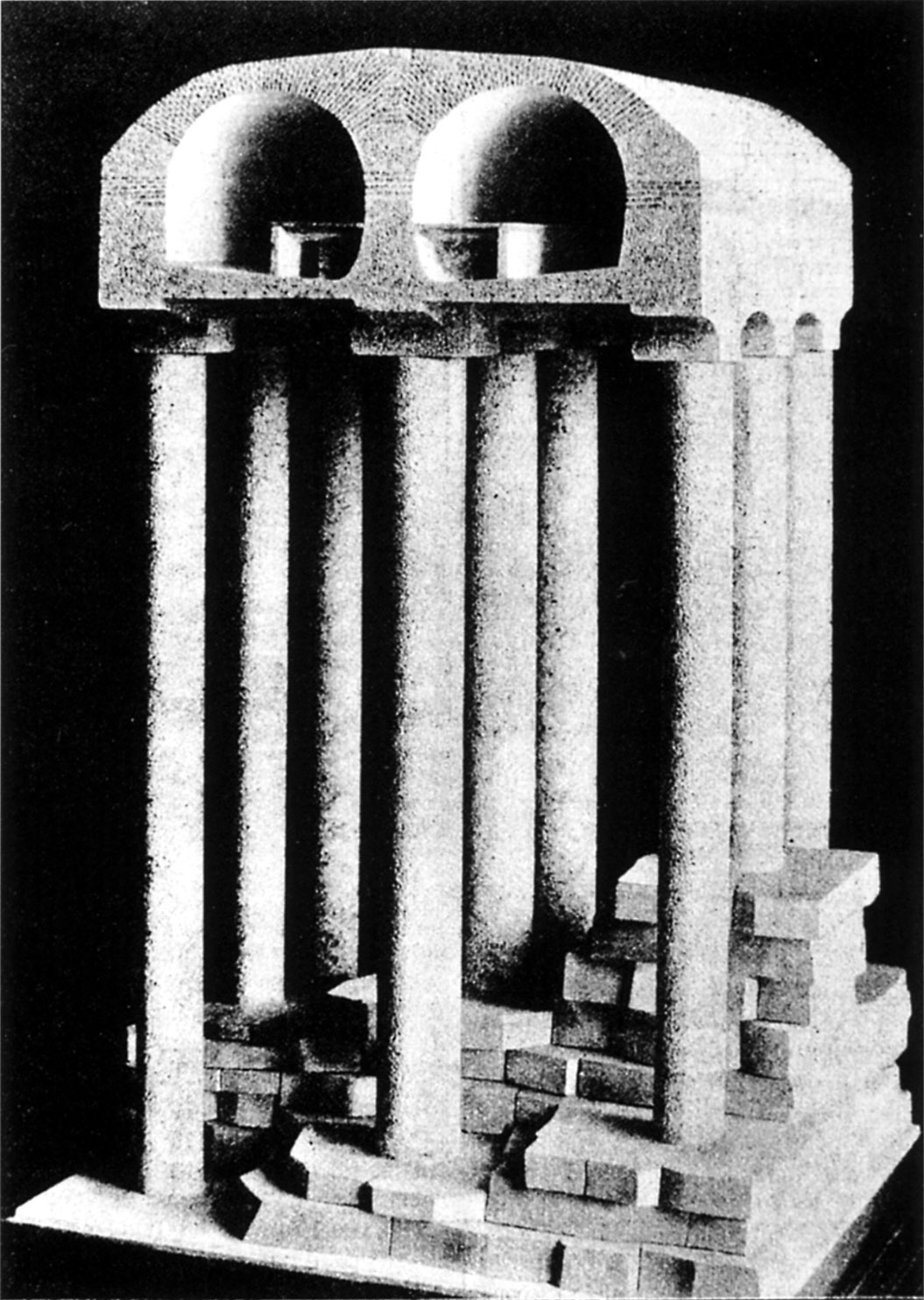 Photo de la maquette de la station Danube de la ligne 7 du métro de Paris (actuelle 7bis), France. La station souterraine est édifiée sur un viaduc en sous-sol, établi dans les carrières de gypse.